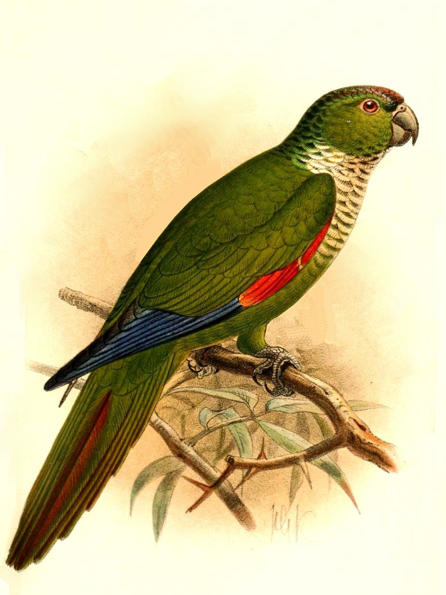 Pyrrhura berlepschi = Pyrrhura melanura berlepschi, Maroon-tailed Parakeet ssp.